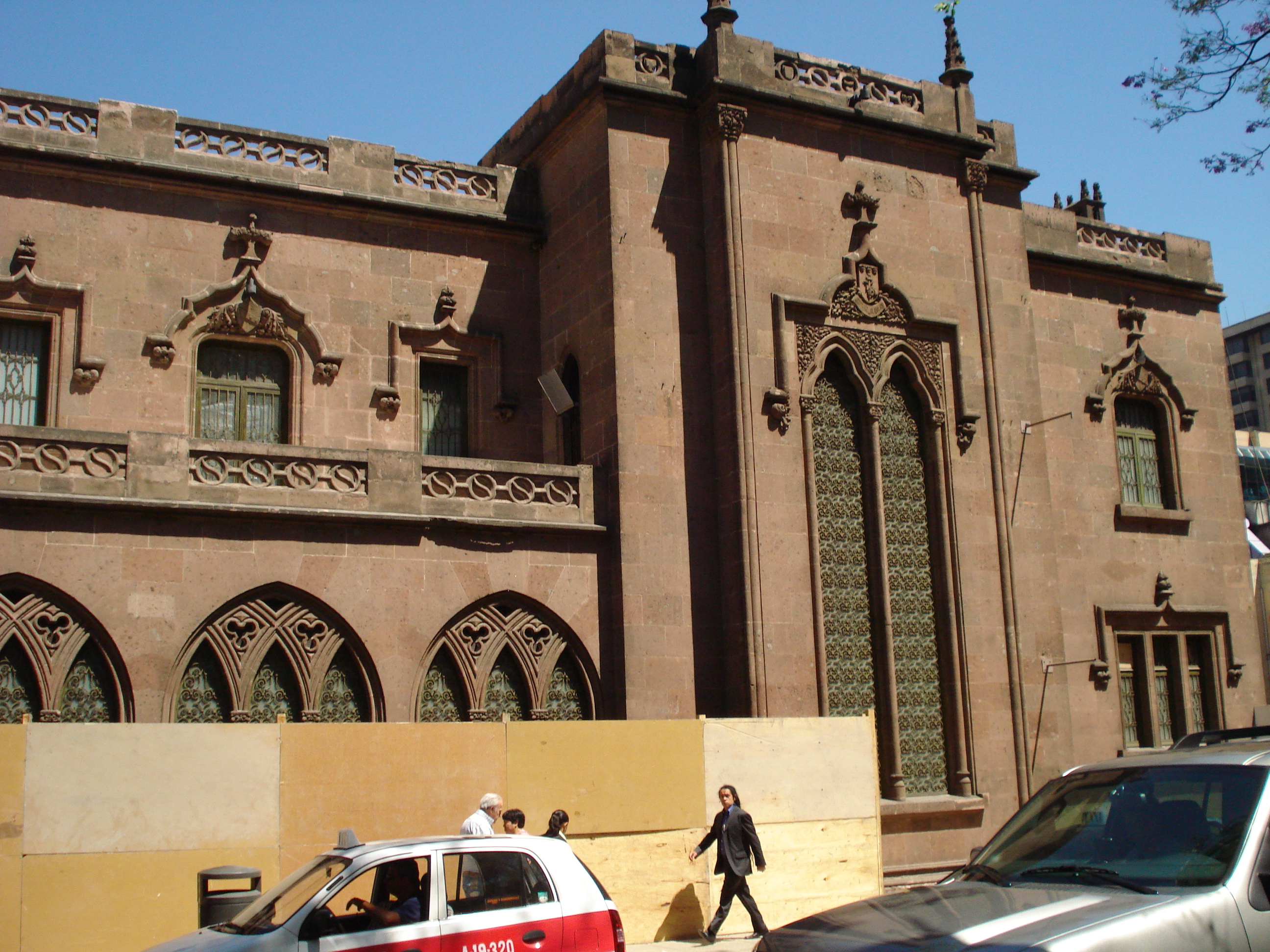 Casa en la avenida Paseo de la Reforma en la Ciudad de México.